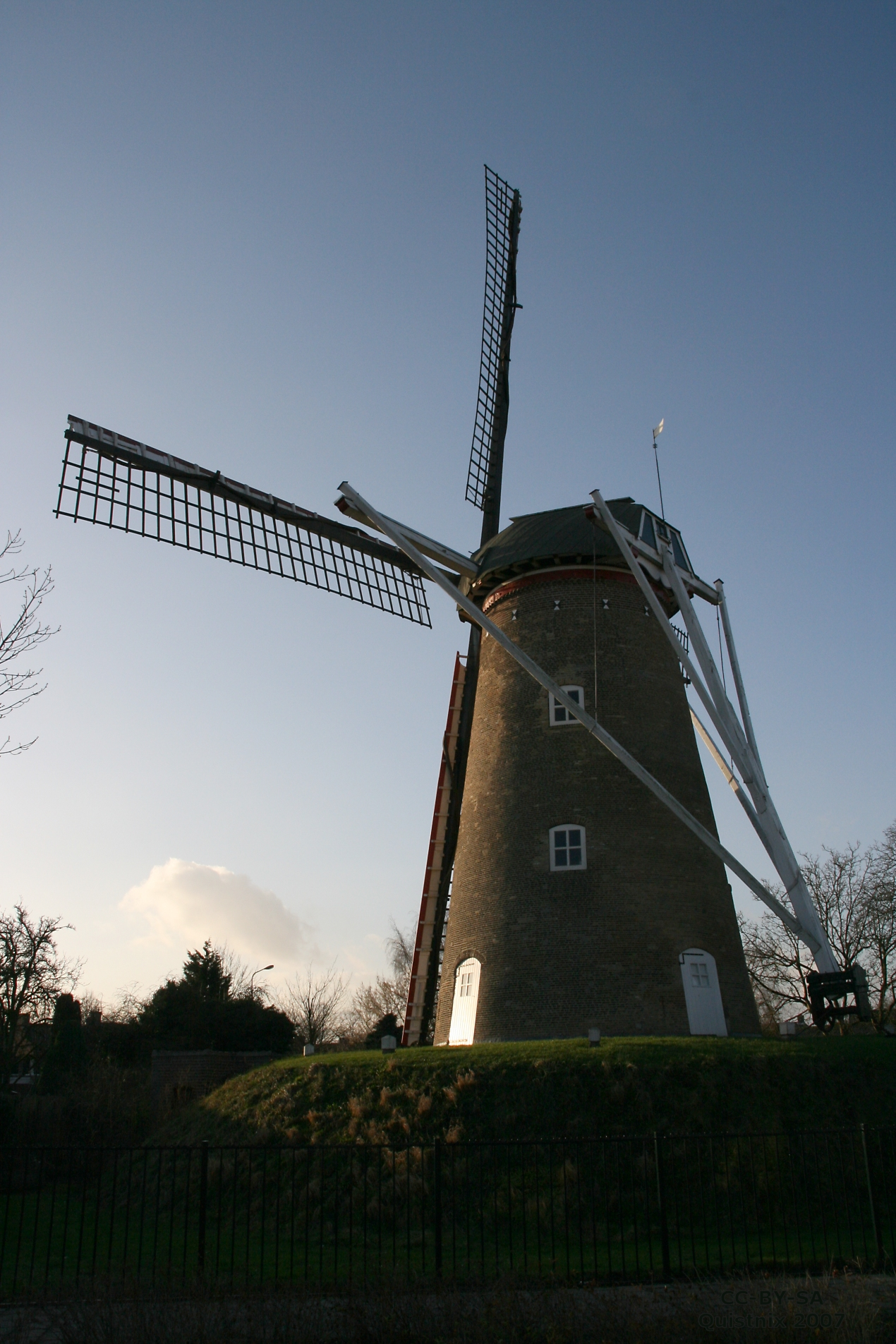 Schijndel, windmolen Aan de Pegstukken